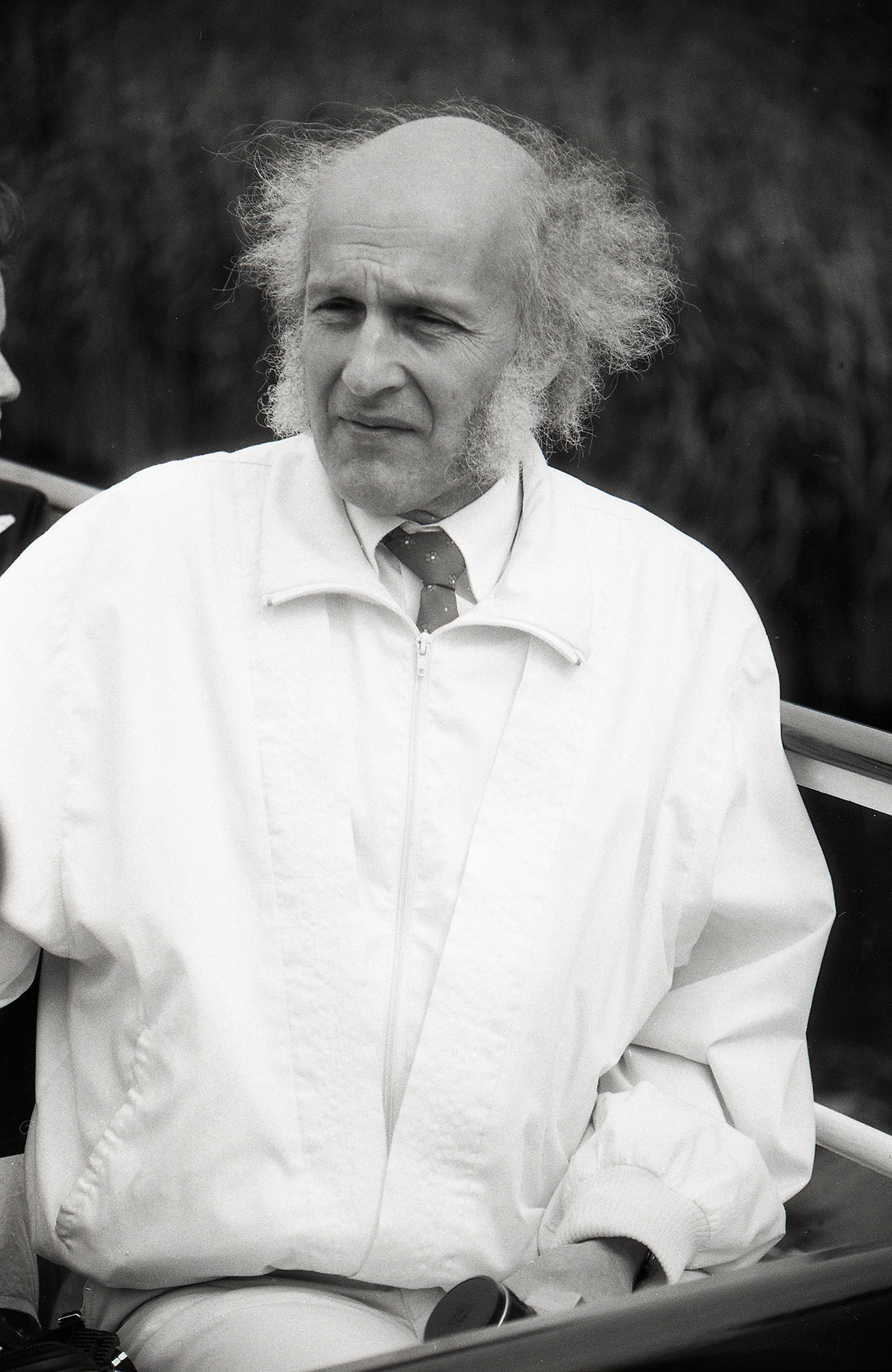 Kalle Tamra, muusikapedagoog 90